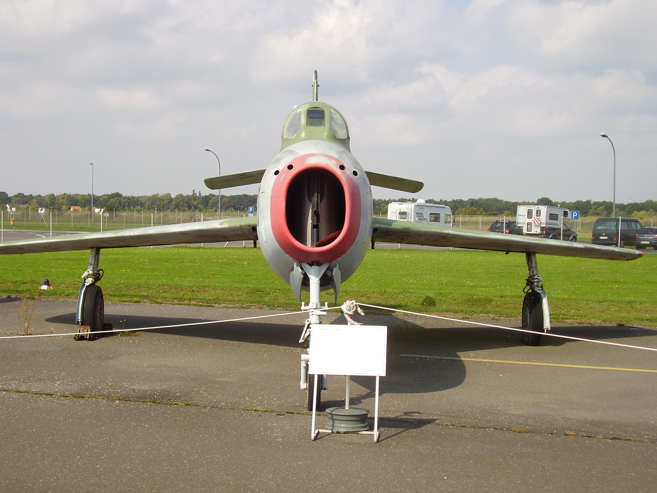 Luftwaffenmuseum der Bundeswehr; Airforce Museum of the Bundeswehr; Berlin-Gatow, F-84F